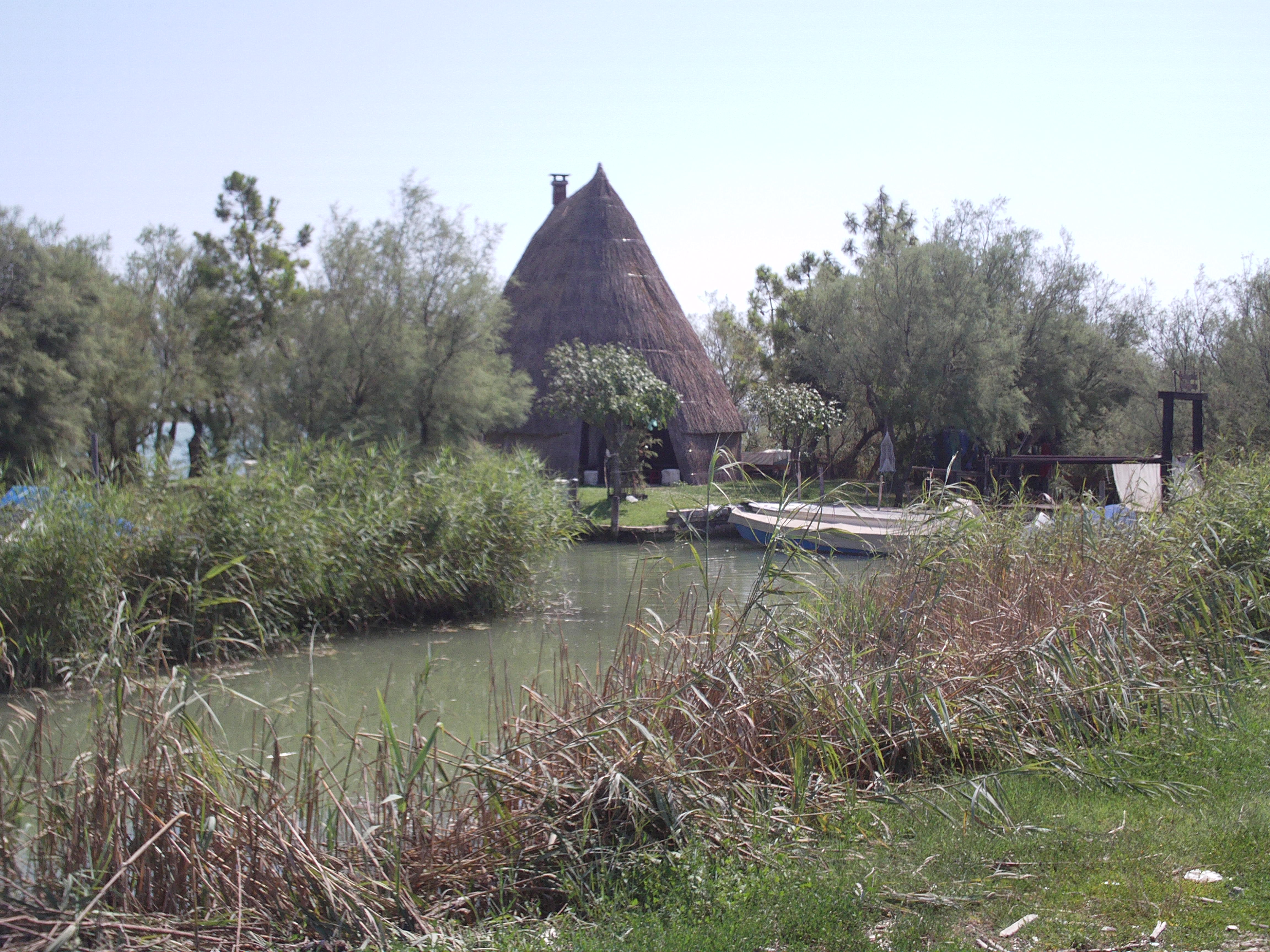 Laguna di Caorle - Foce del Tagliamento (Q55719904)